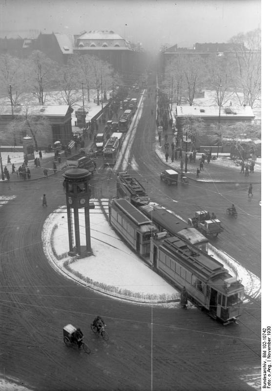 This description has been identified as biased or incorrect: Nach den abgebildeten Gebäuden muss die Aufnahme zwischen 1924 und 1927 entstanden sein.Berlin im ersten Schnee! Blick auf den Potsdamer Platz und die Leipziger Straße im ersten Winterschnee